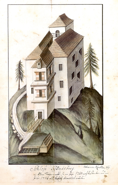 Zeichnung der Burg Pflindsberg, in der politischen Expositur Bad Aussee (Steiermark).